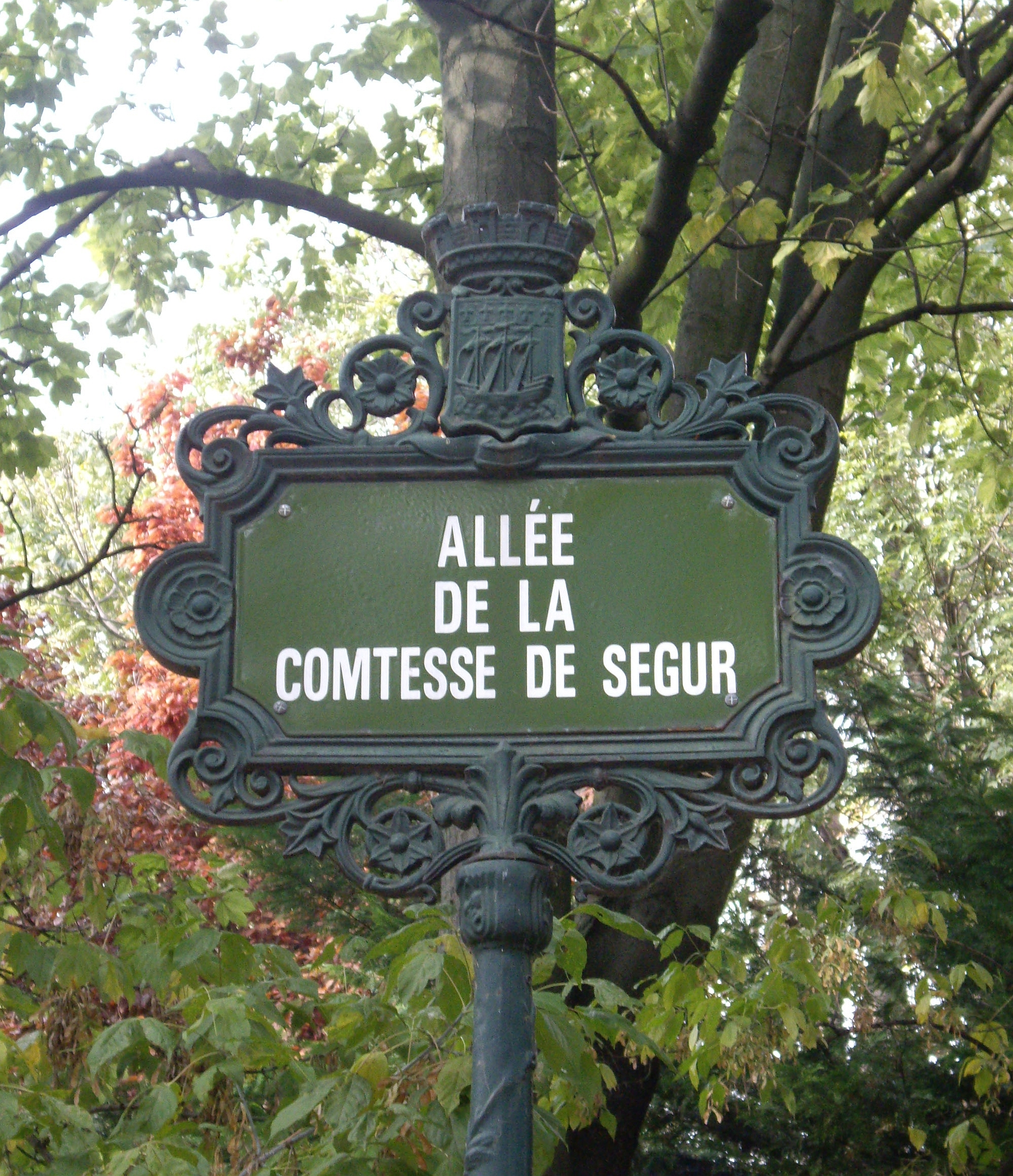 Allée de la Comtesse-de-Ségur, Parc Monceau, Paris 8e.